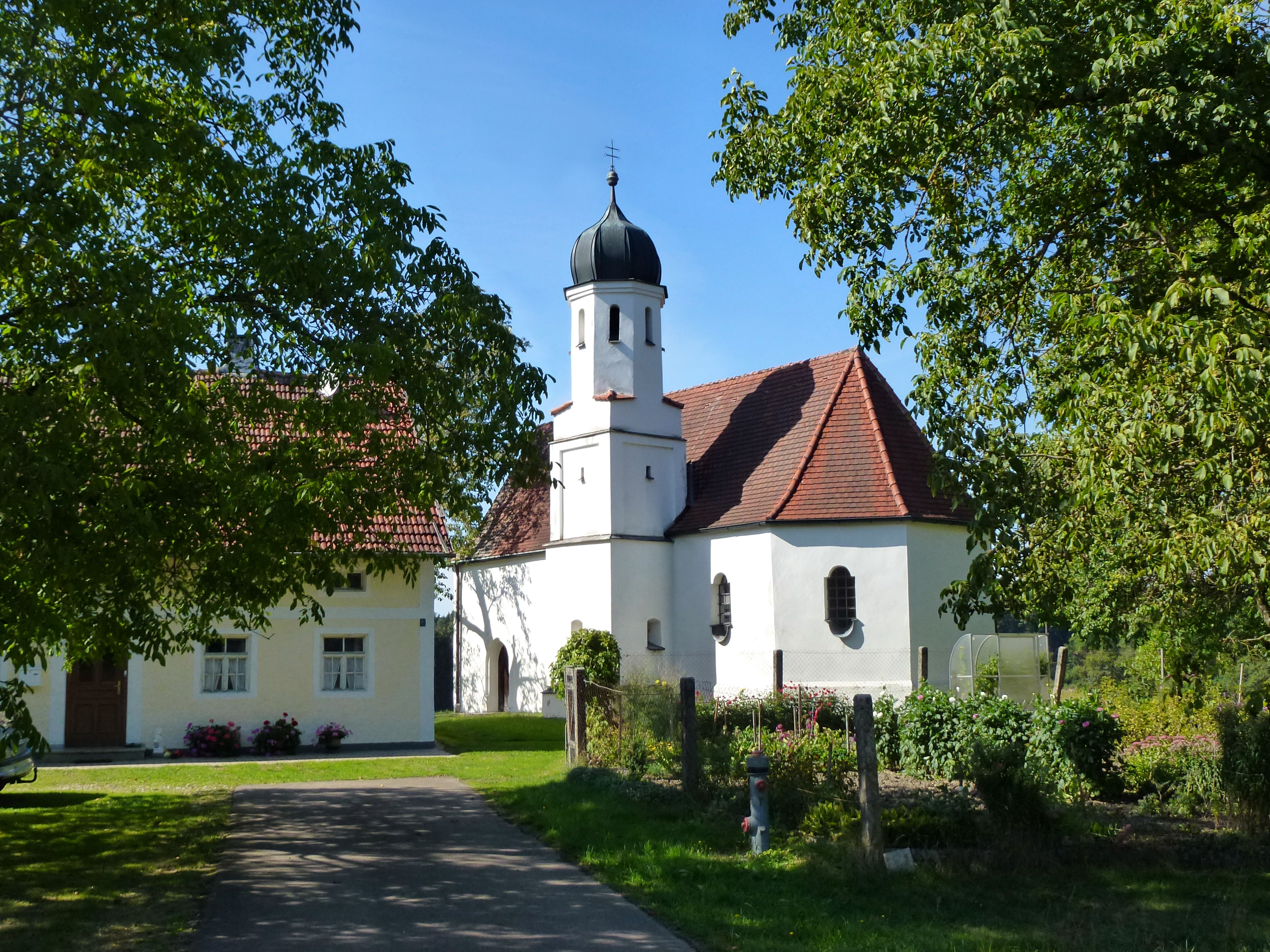 Michelskirchen, Michelskirchen 4: Katholische Filialkirche St. Michael. Ansicht von ONO